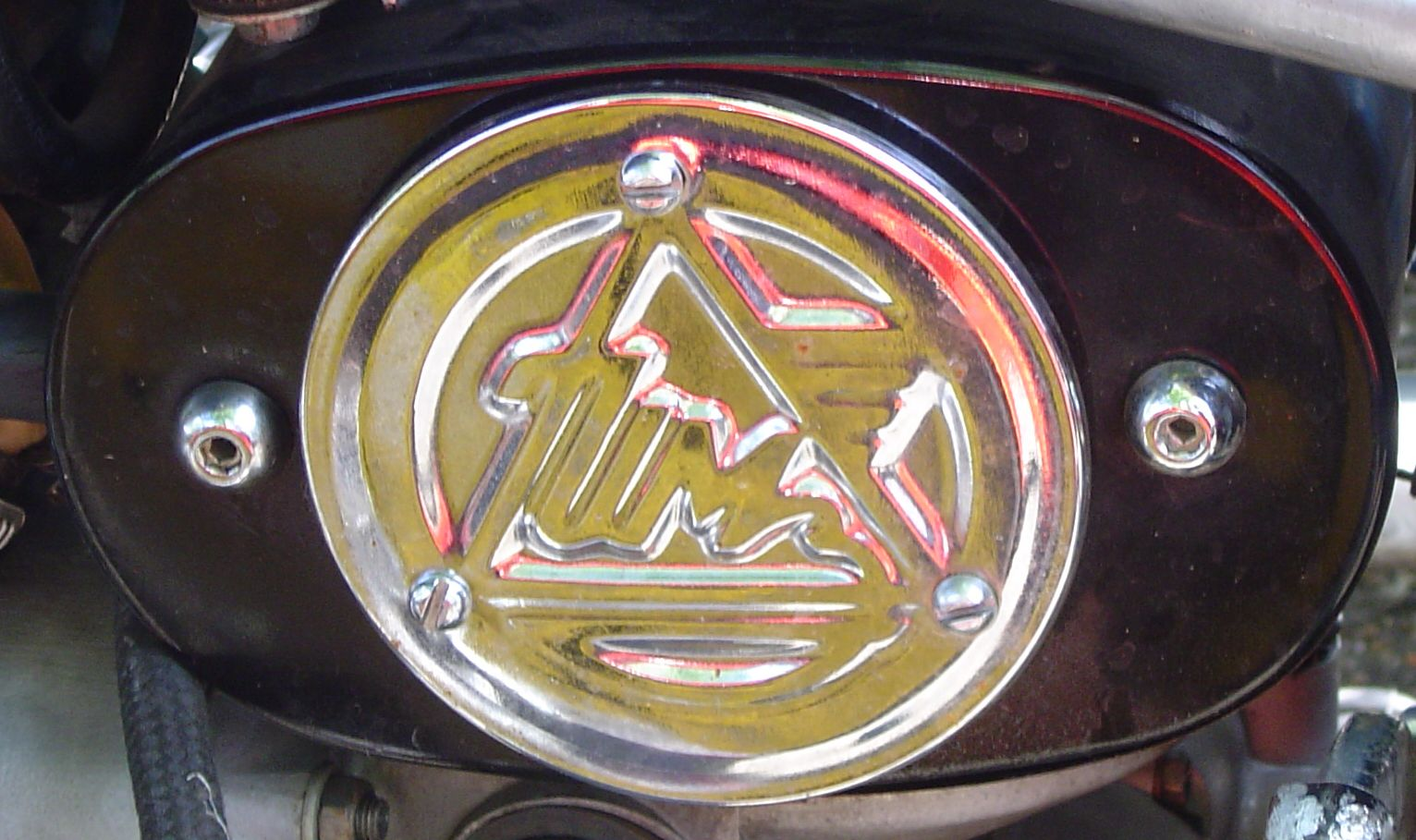 ウラルモト社（IMZ社）ロゴ.